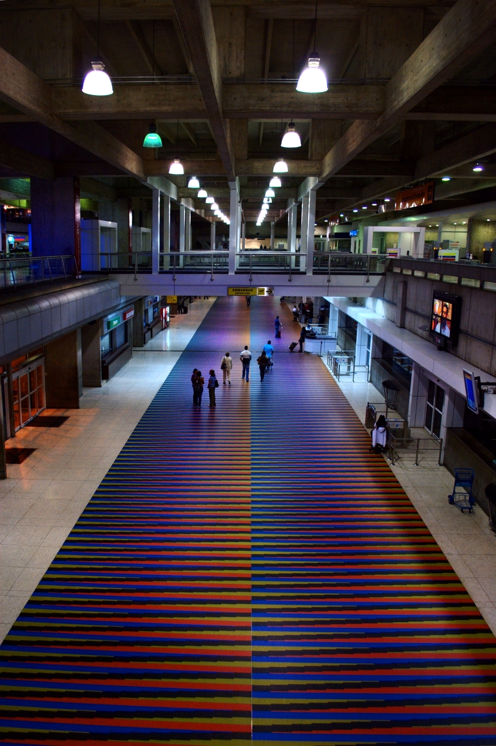 Aeropuerto Internacional de Maiquetía Simón Bolívar (CCS)